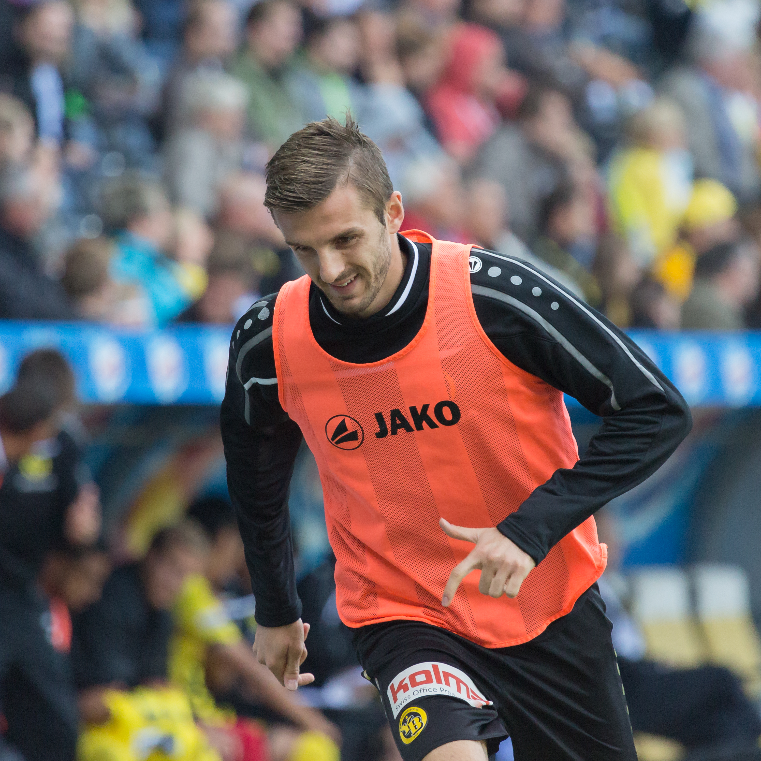 Adrian Nikci beim Spiel des BSC Young Boys gegen den FC Luzern; im Hintergrund Steve von Bergen